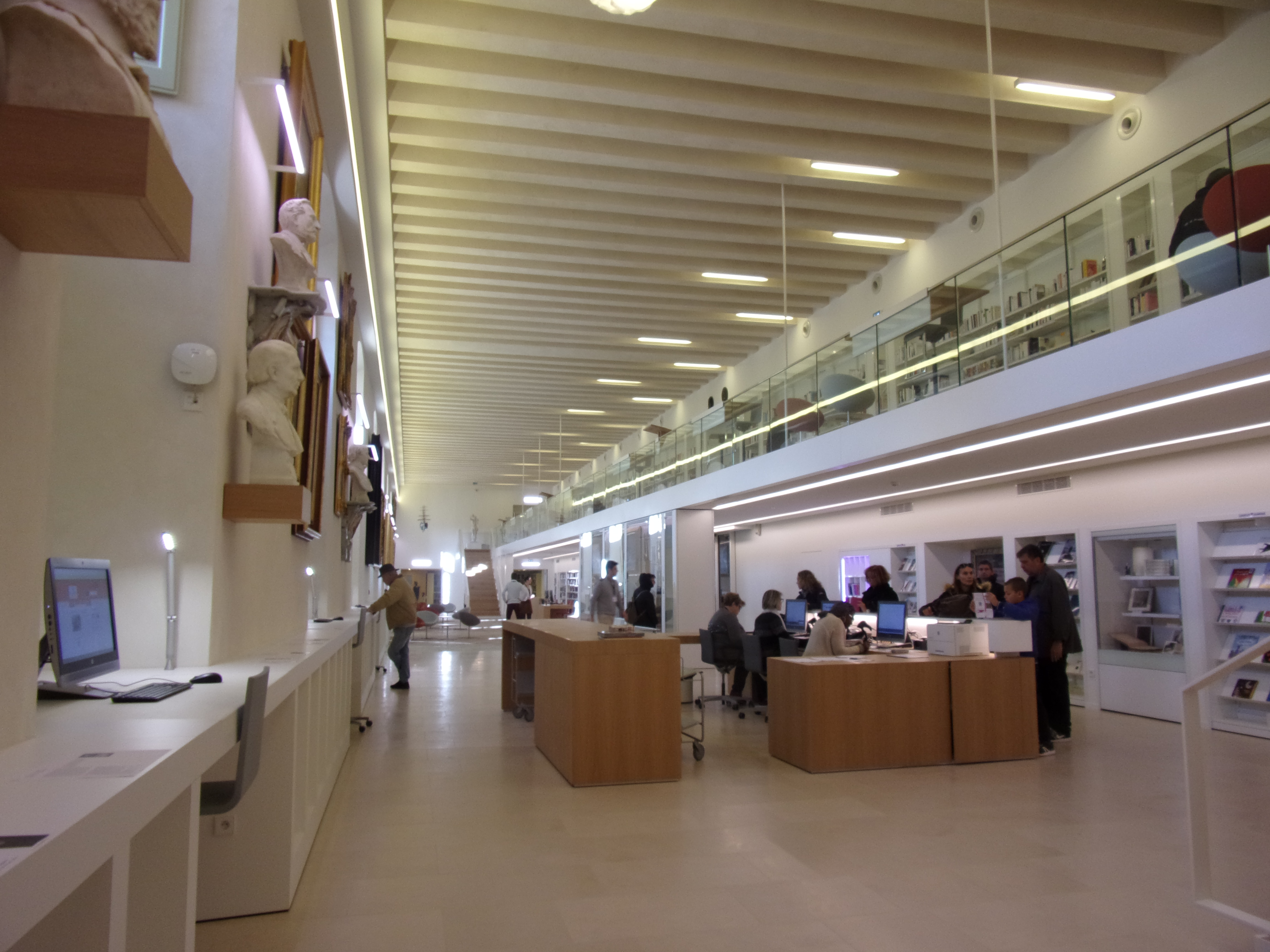 aménagement de la bibliothèque Inguimbertine, à l'hôtel dieu de Carpentras